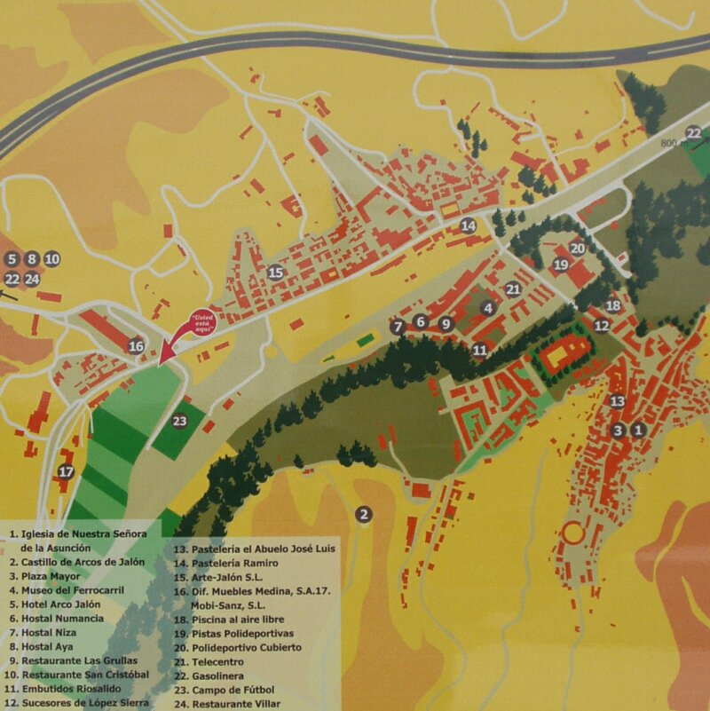 Plano de Arcos de Jalón, en Soria (España)